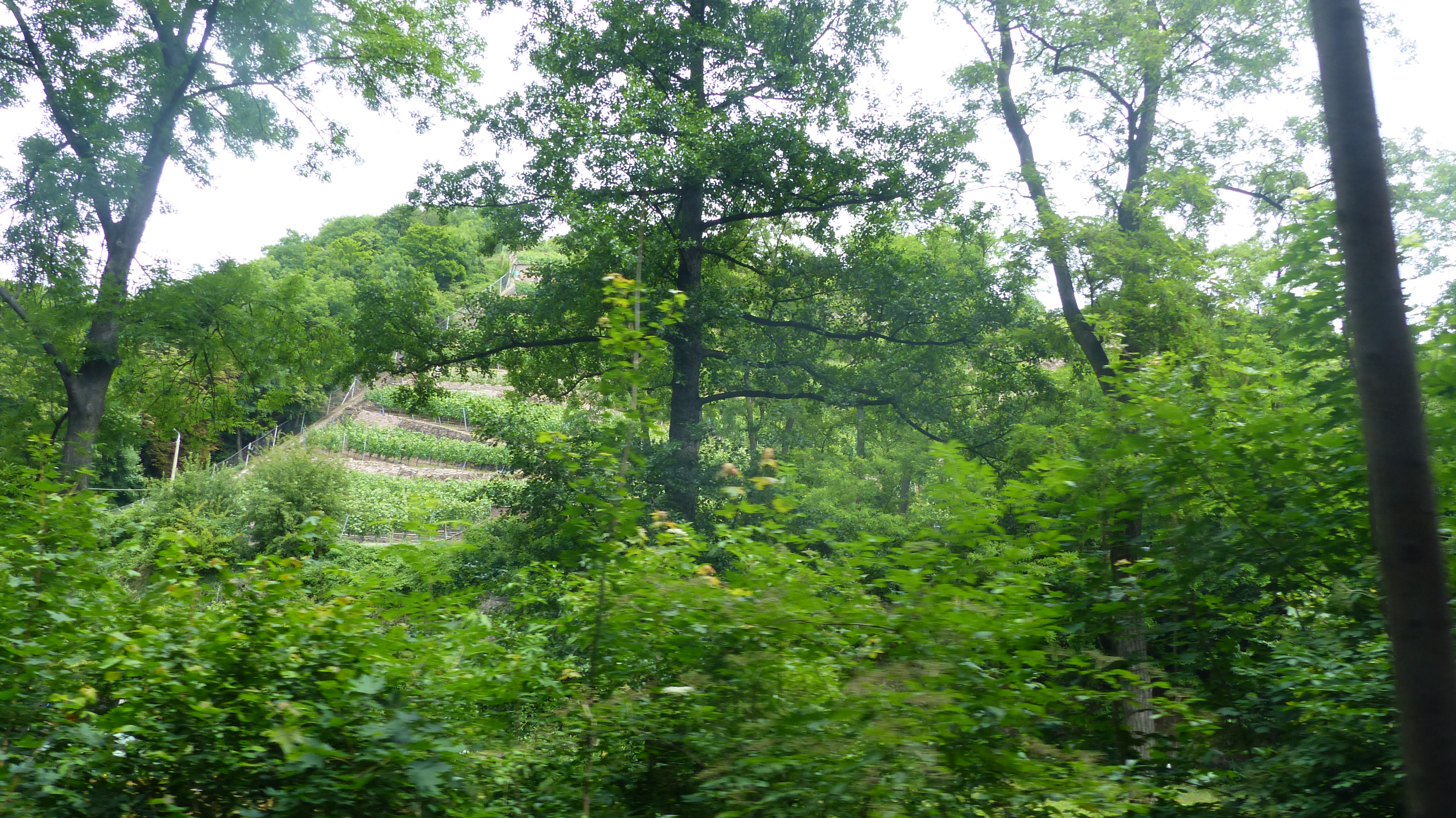 Lößnitzgrund im Landschaftsschutzgebiet Friedewald, Moritzburger Teichgebiet und Lößnitz